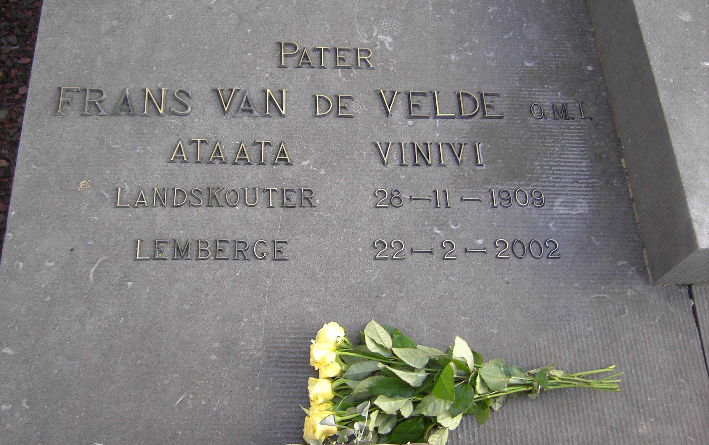 Gaf van Pater Van De Velde - Landskouter - Oosterzele - Oost-Vlaanderen - België